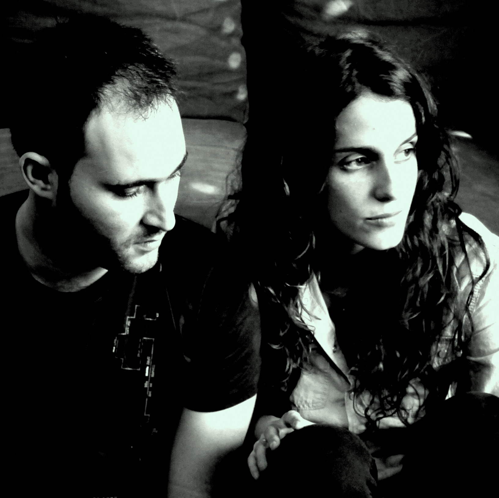 דניאלה ובן ספקטור.